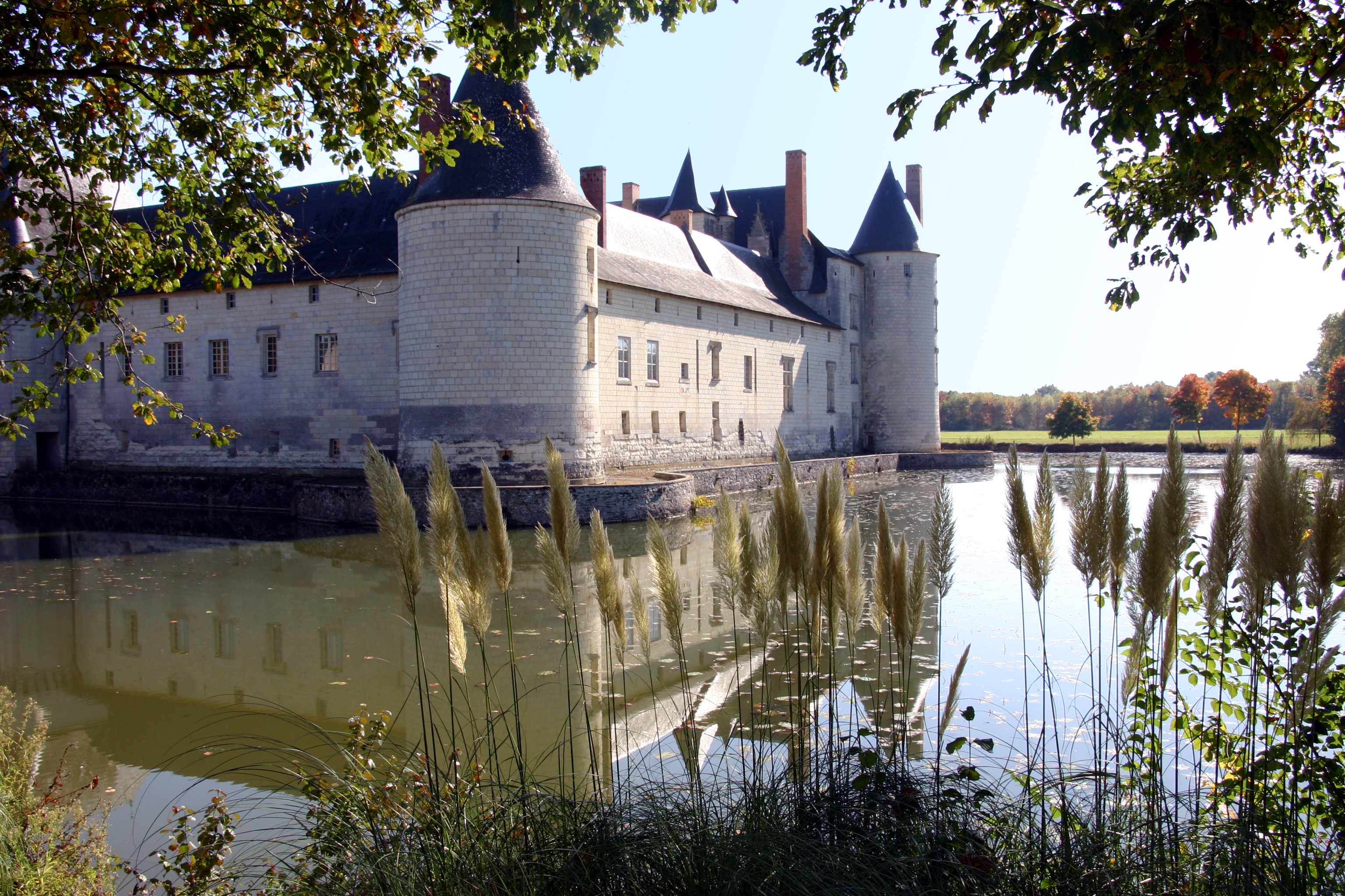 Schloss Plessis-Bourré